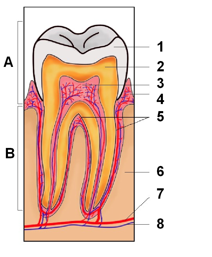 Estructura dentaria sometida a desarrollo. Clave numérica: 1 esmalte 2 dentina 3 pulpa 4 gengiva 5 cemento 6 ossso 7 vaso sanguíneo 8 nervos Cross section showing parts of tooth. Changed from Image:ToothSection.jpg to international format.